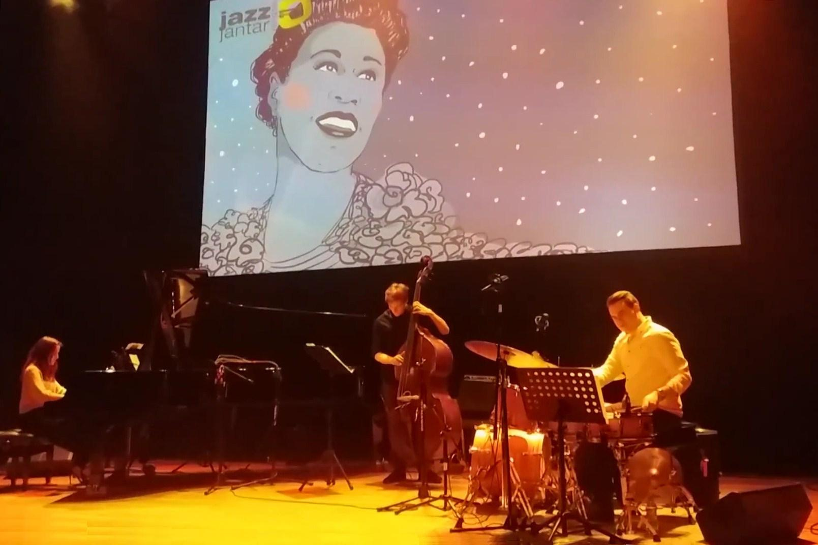 Gdańsk. Festiwal Jazz Jantar w 2017, koncert Aga Derlak Trio.